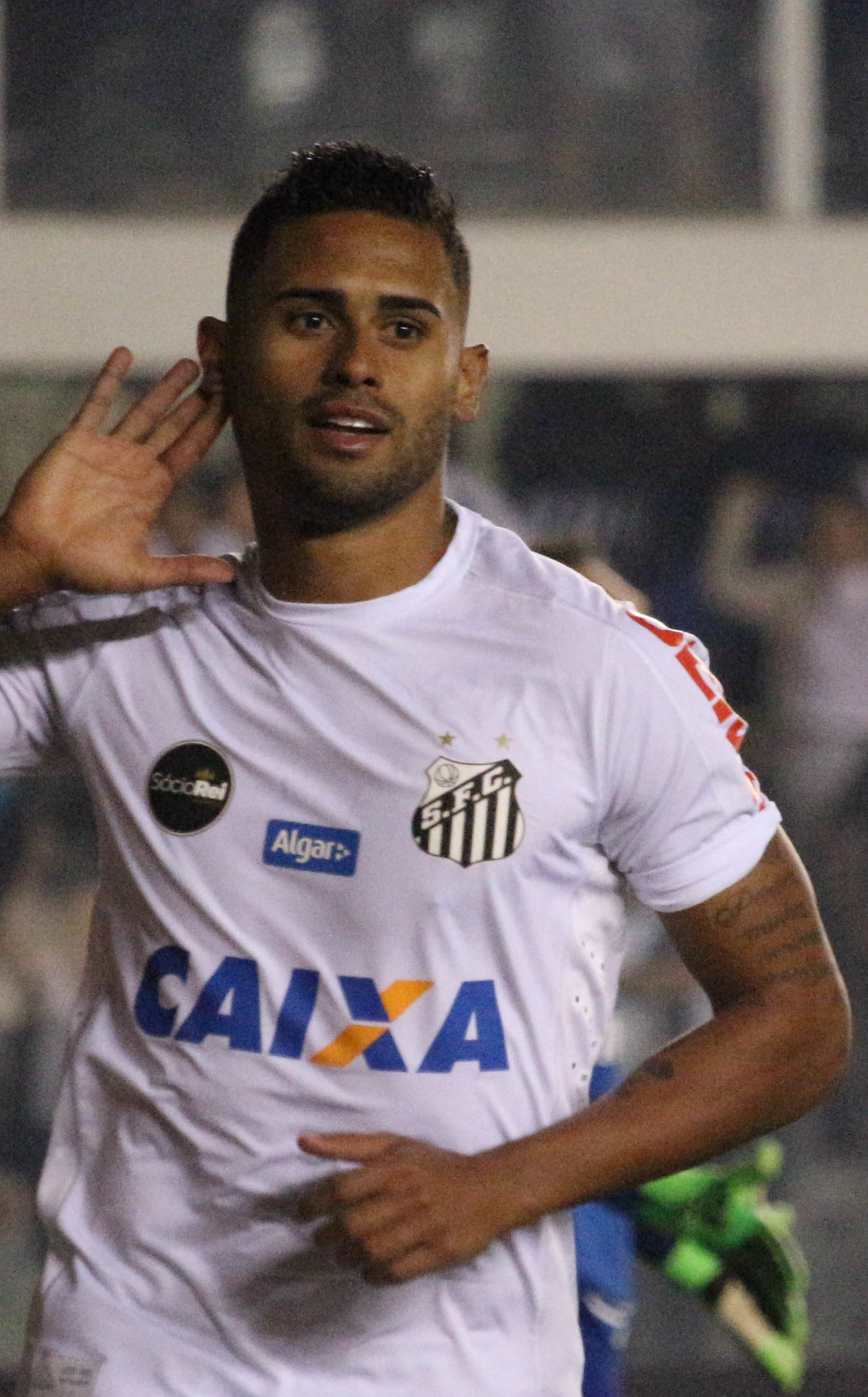 Foto: Douglas Teixeira/Futebol Santista